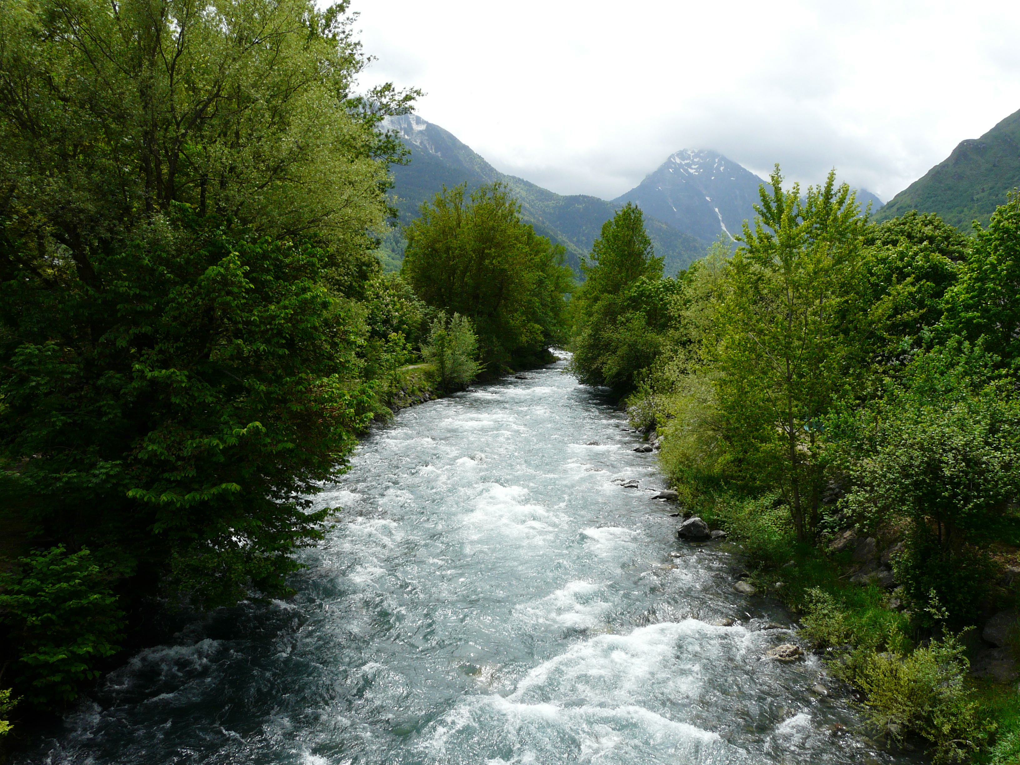 La Neste d'Aure vue vers l'amont à Vielle-Aure, Hautes-Pyrénées, France.